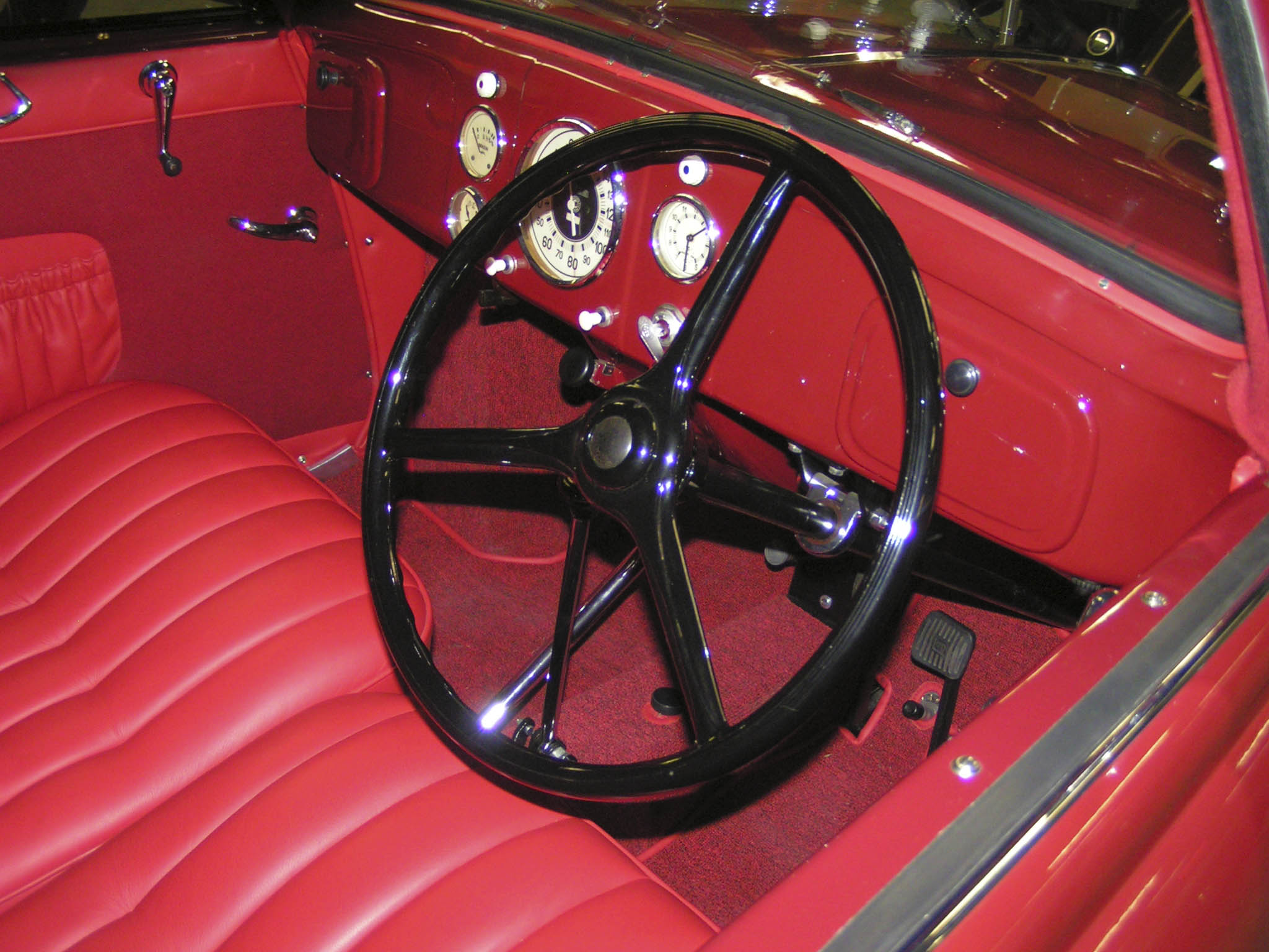 Tatra T97Tatra T97